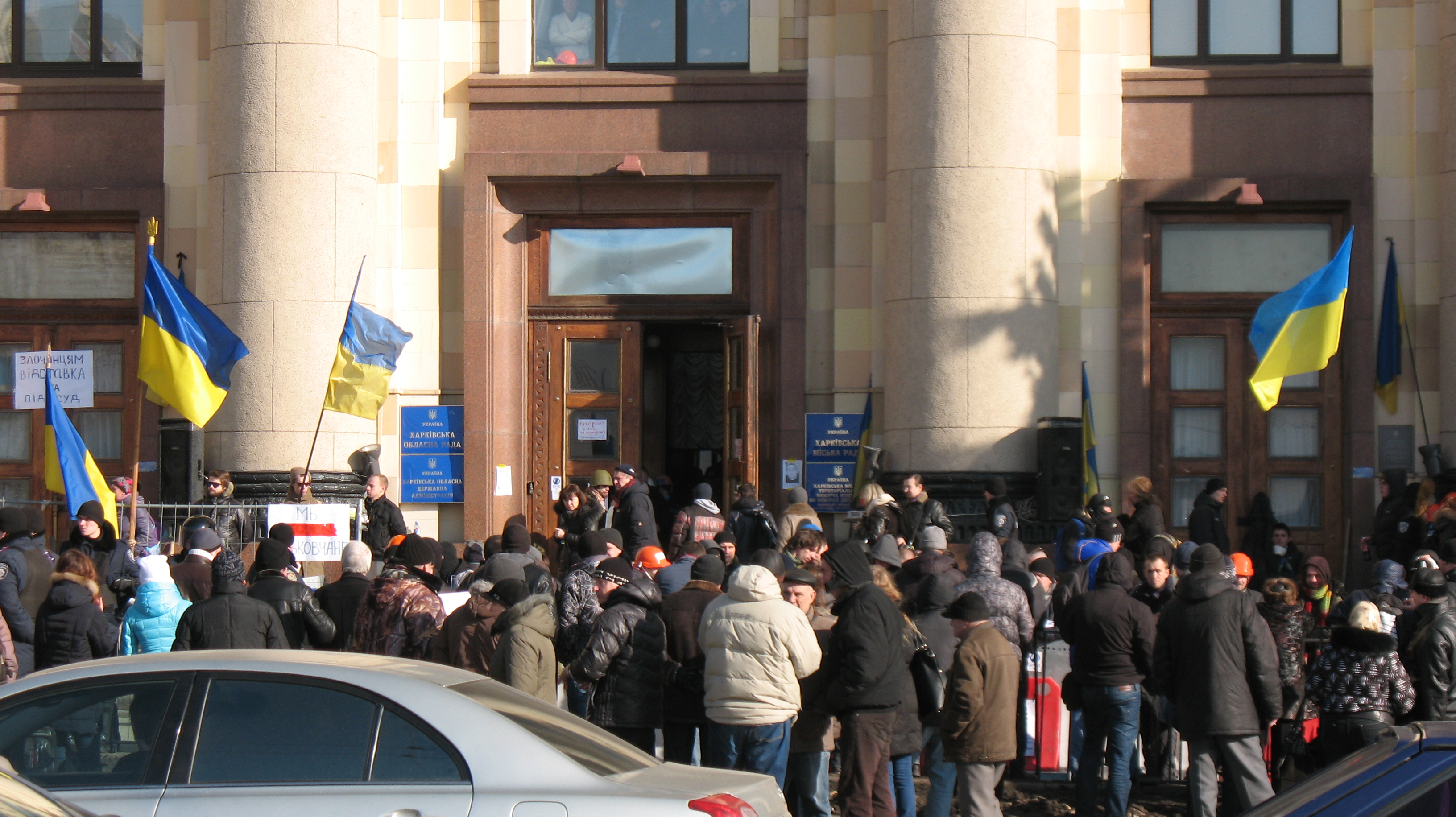 Харьков, 23 февраля. Площадь Свободы. Областная администрация, первый день после ночного захвата её боевиками "Правого сектора" (в основном из Ивано-Франковской области).